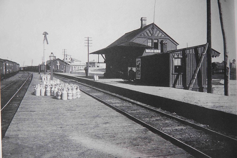 Gare du Mile End avant 1913